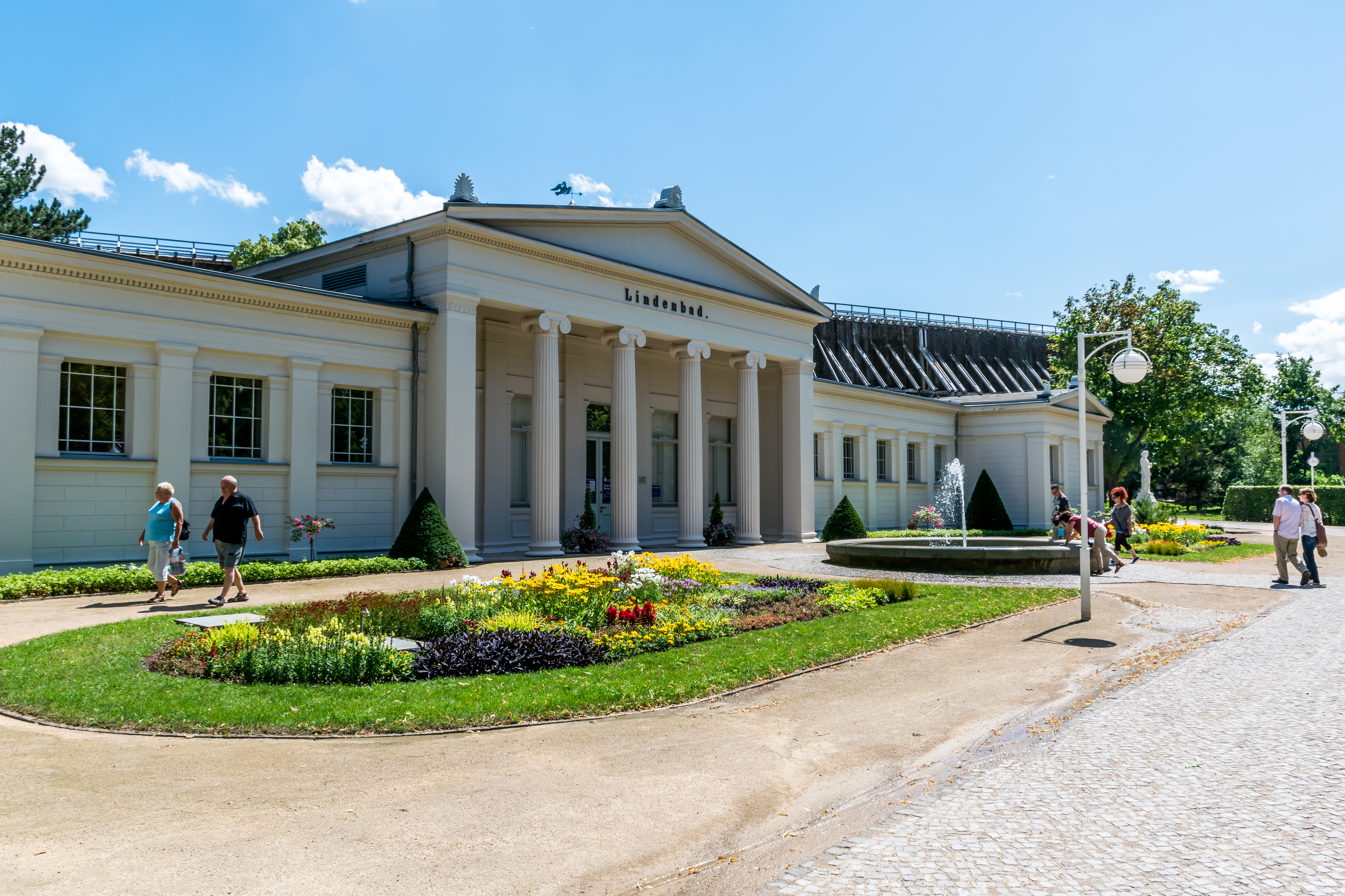 Kurmittelhaus "Lindenbad" auf dem Gelände der Kuranlage Solbad Salzelmen in Schönebeck (Elbe), Sachsen-Anhalt, Deutschland